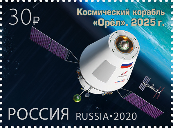 9 июня в обращение вышел почтовый блок с 3 марками «Россия — космическая держава»